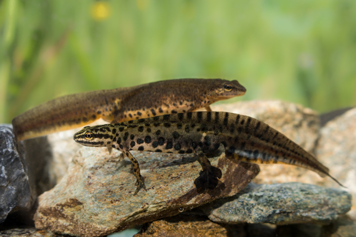 K.Kalaentzis - Lissotriton graecus